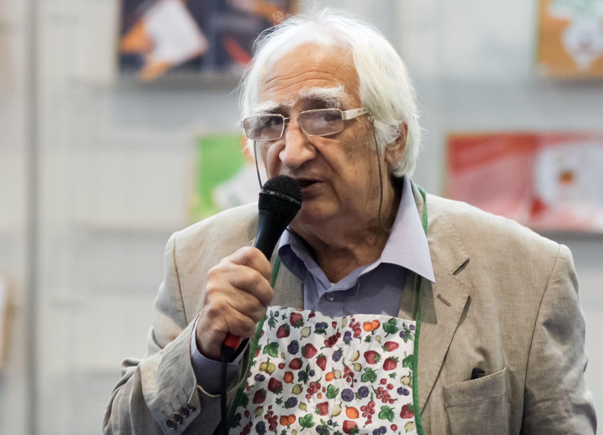 Поэт Александр Тимофеевский на ММКВЯ-2011